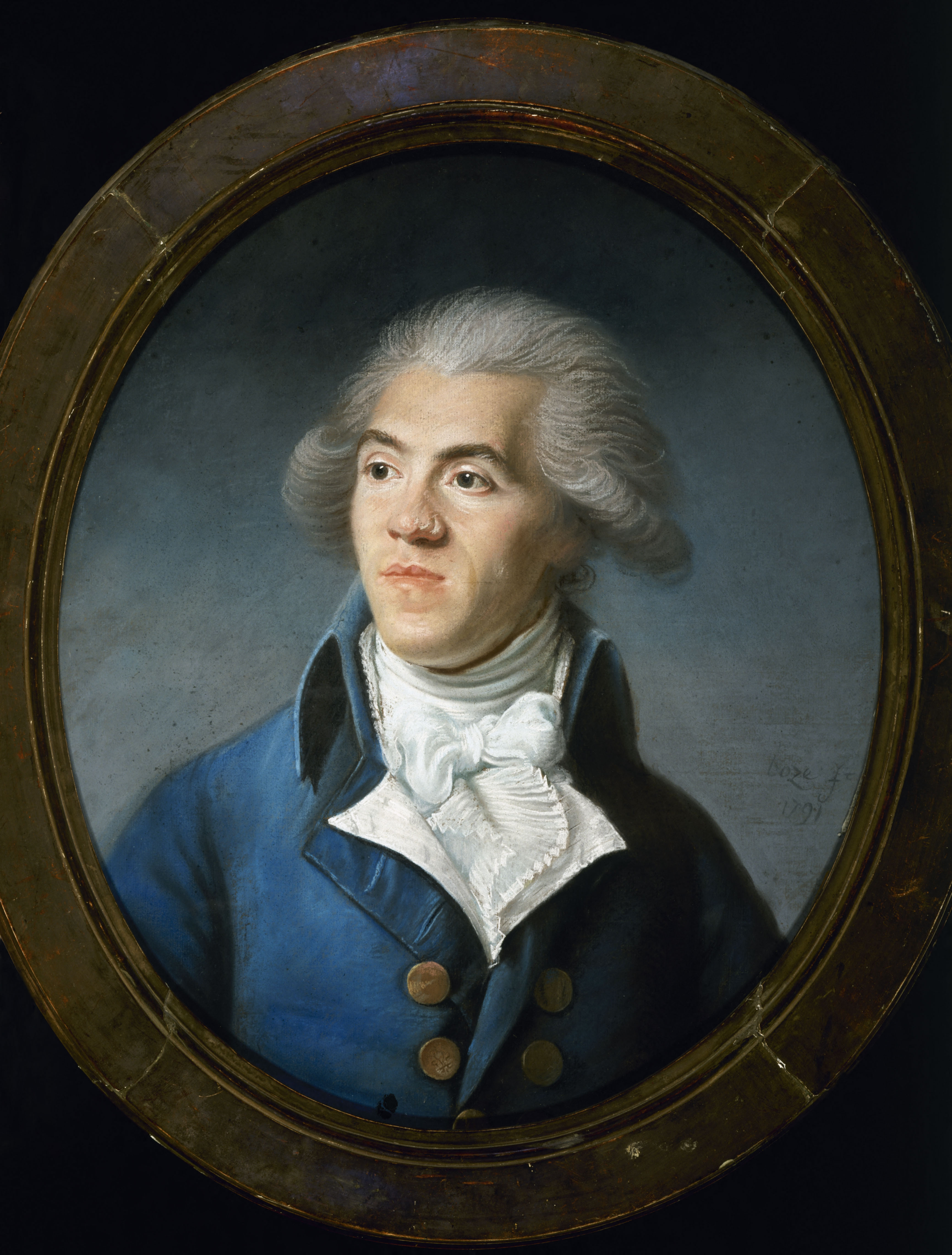 Portrait présumé d'Antoine-Pierre-Joseph-Marie Barnave (1761-1793), dessin de Joseph Boze, musée Carnavalet, 1791.